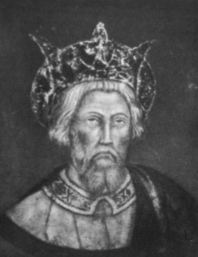 Pisanello (attr.), effige di carlo magno, museo di palazzo venezia